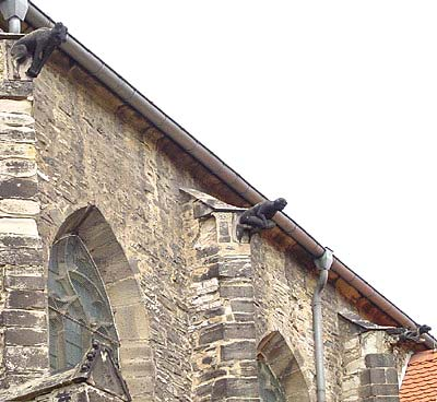 Urheber: Dieter Steinmetz]